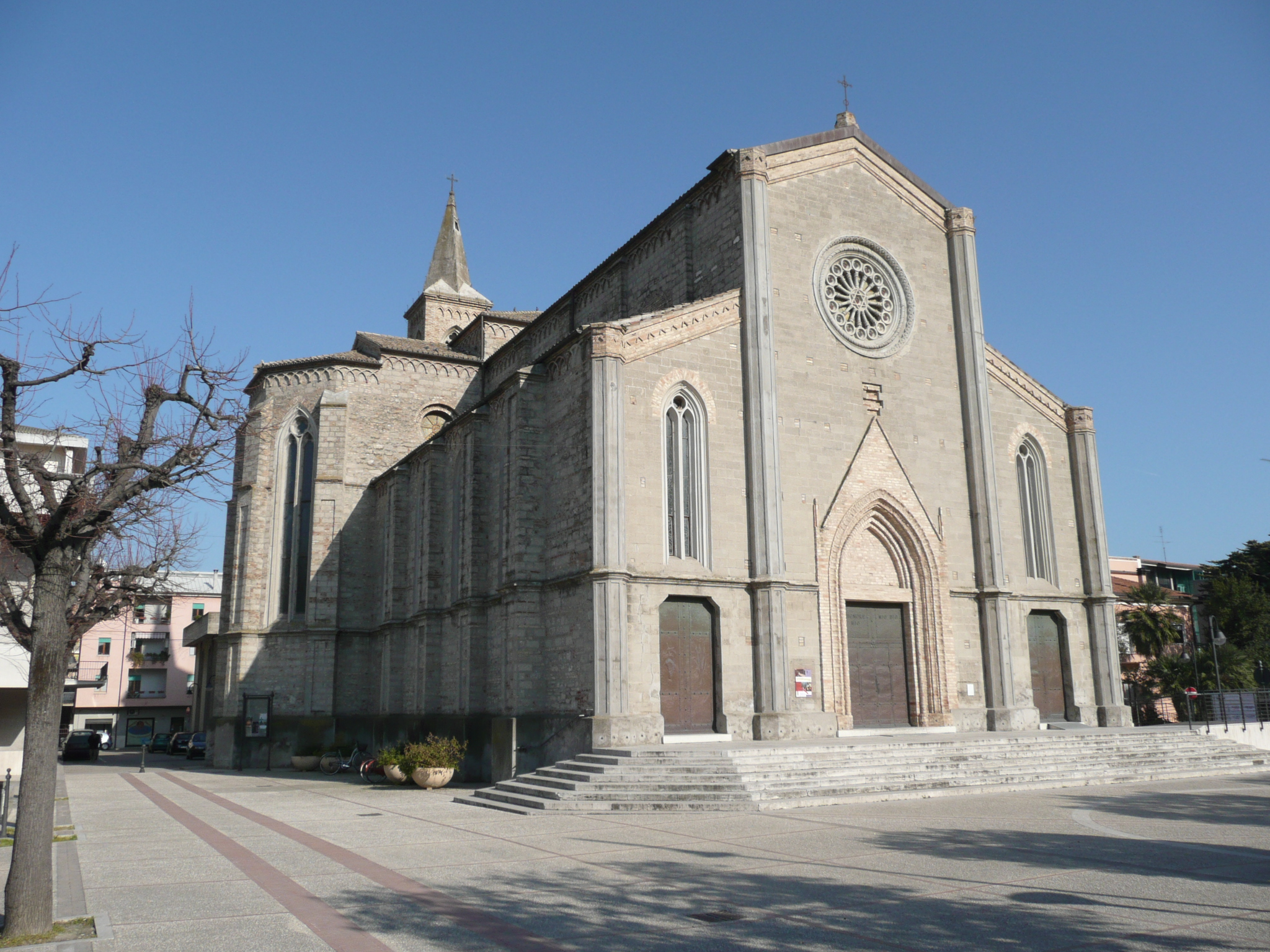 Piazza Roma